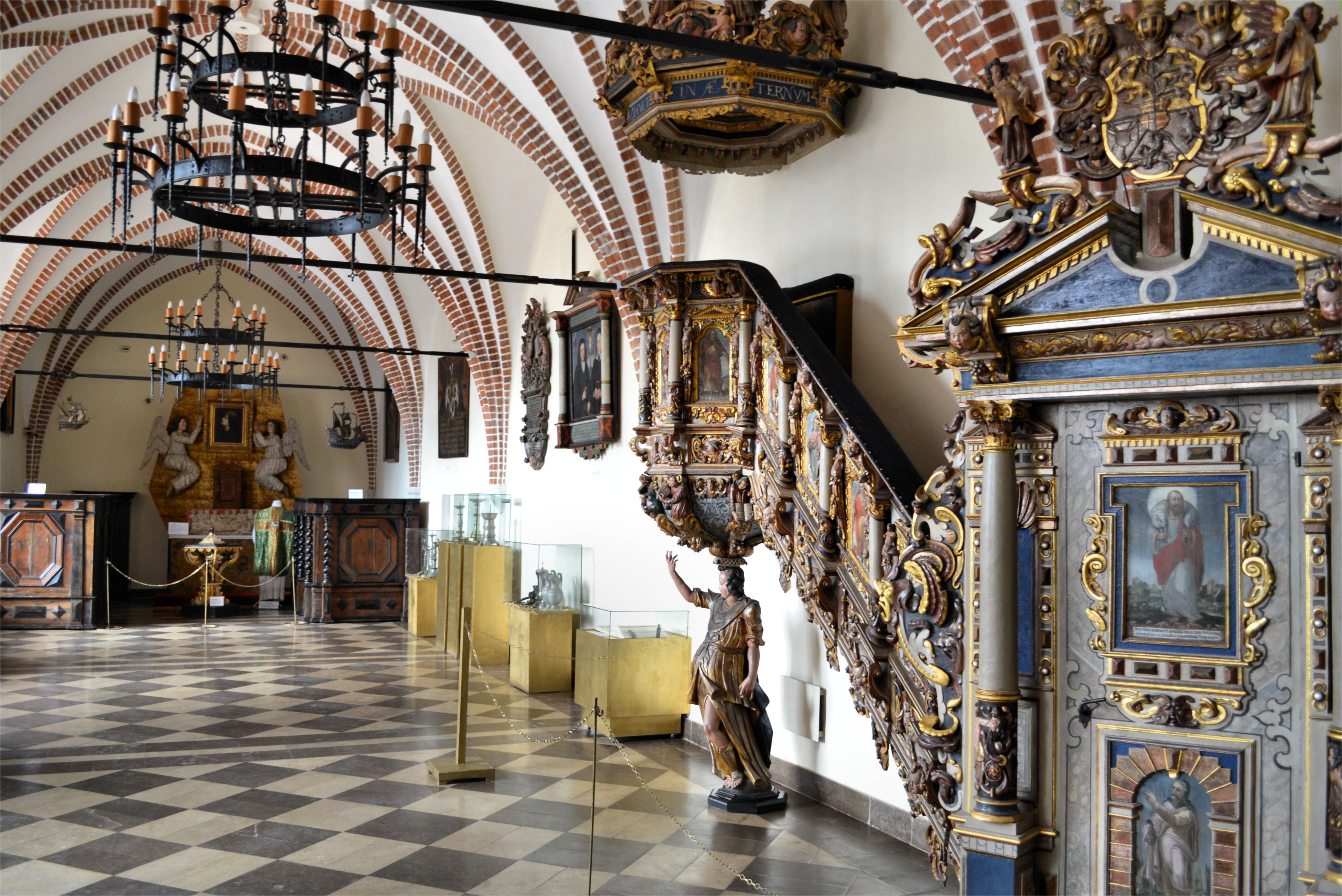 Ekspozycja Zamku Książąt Pomorskich - Muzeum w Darłowie